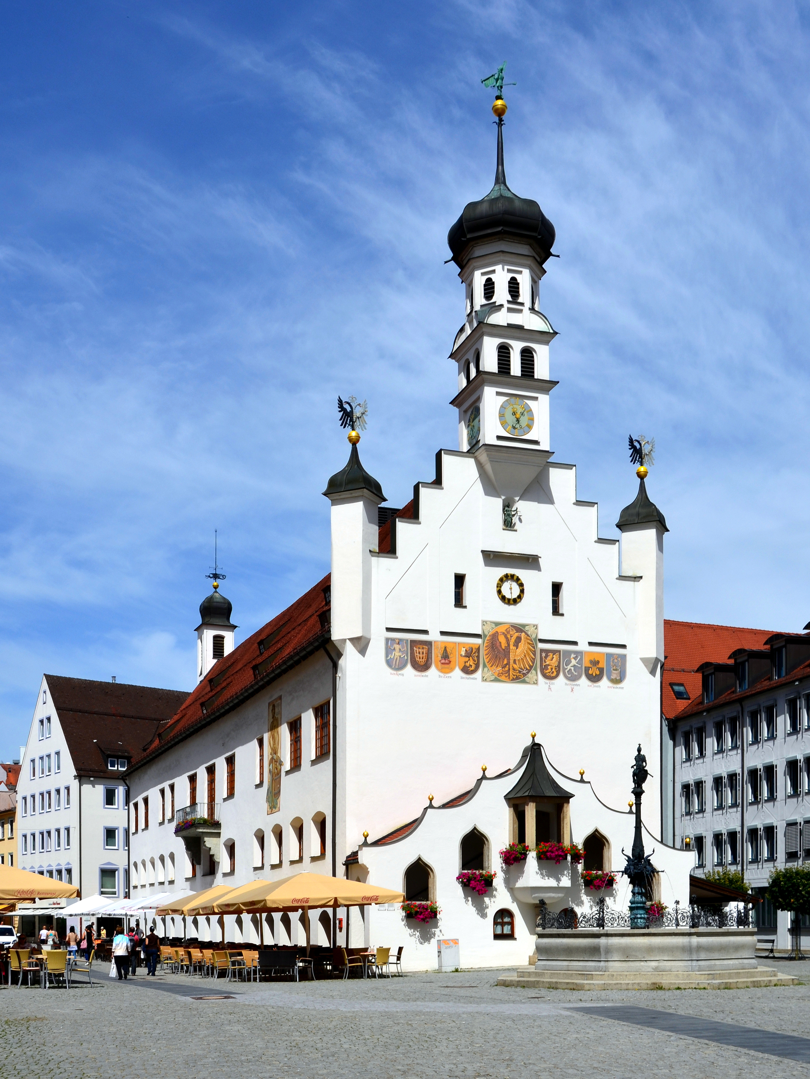 Das alte Rathaus in Kempten